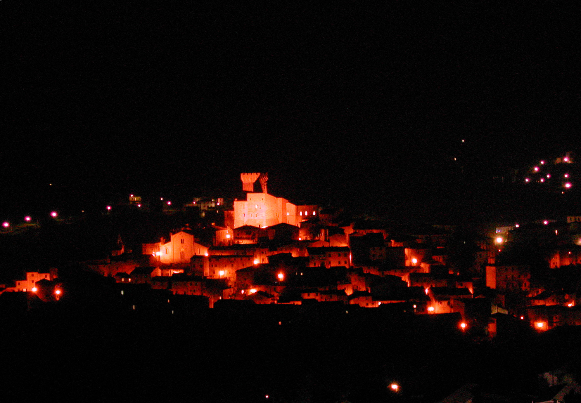 Foto panoramica di Arcidosso di notte, l'autore sono io stesso, opera propria dalla cartella immagini del mio pc, Arcidosso di notte